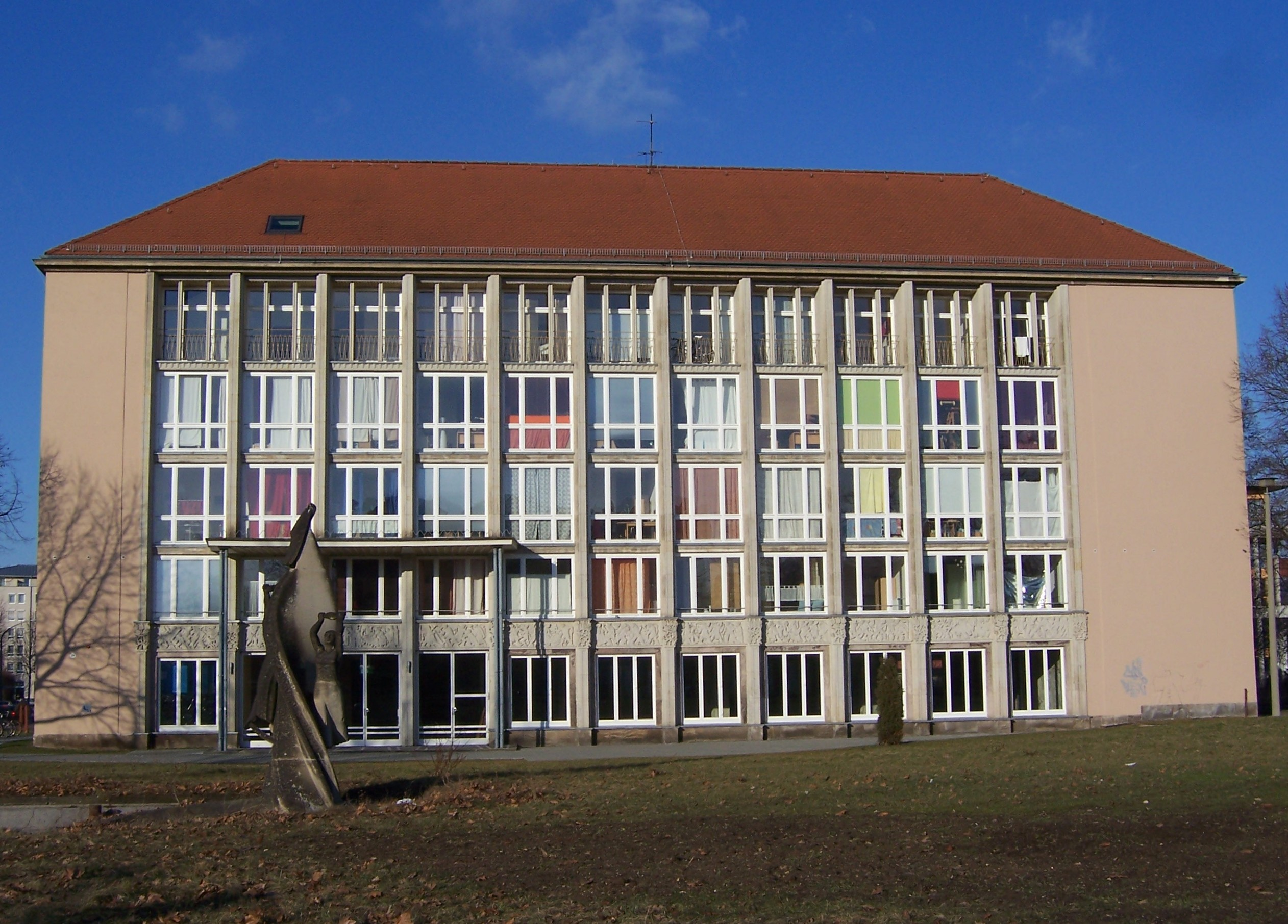 Studentenwohnheim an der Güntzstraße in Dresden mit einer Brunnenskulptur von Max Lachnit.